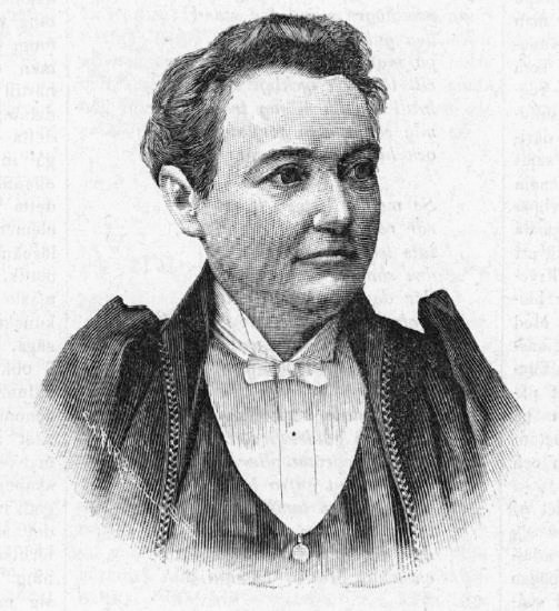 Den kloka gumman Kristina Larsson från Lund.